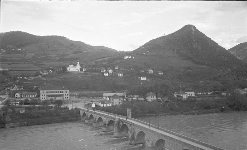 Jugoslawien, 1941 Wischegradan an der Drina (Višegrad) mit der berühmten Brücke von 1571